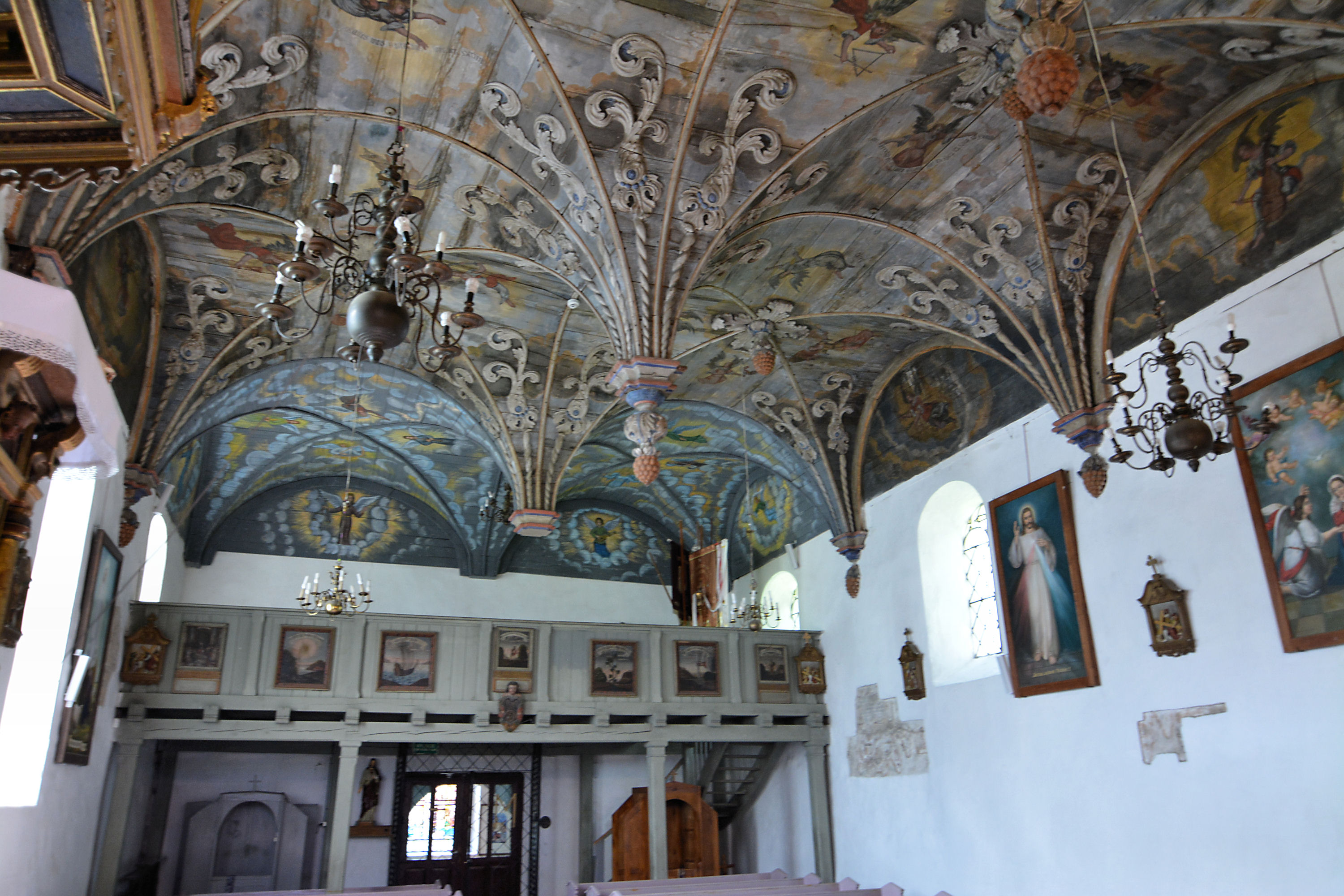 Kościół w Brzesku (koło Pyrzyc)